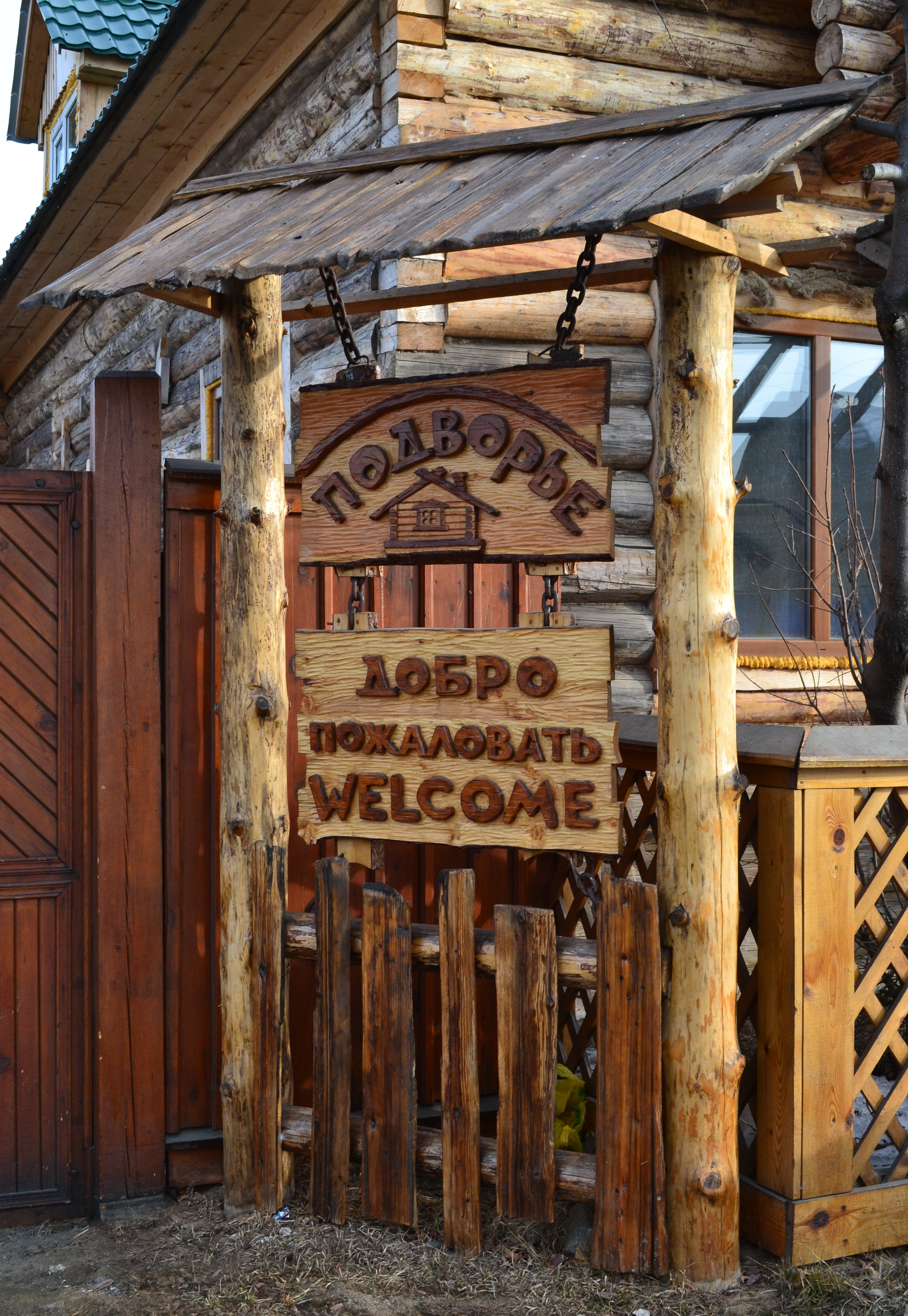 Гостевой дом в Горячинске. Прибайкальский район, Бурятия.